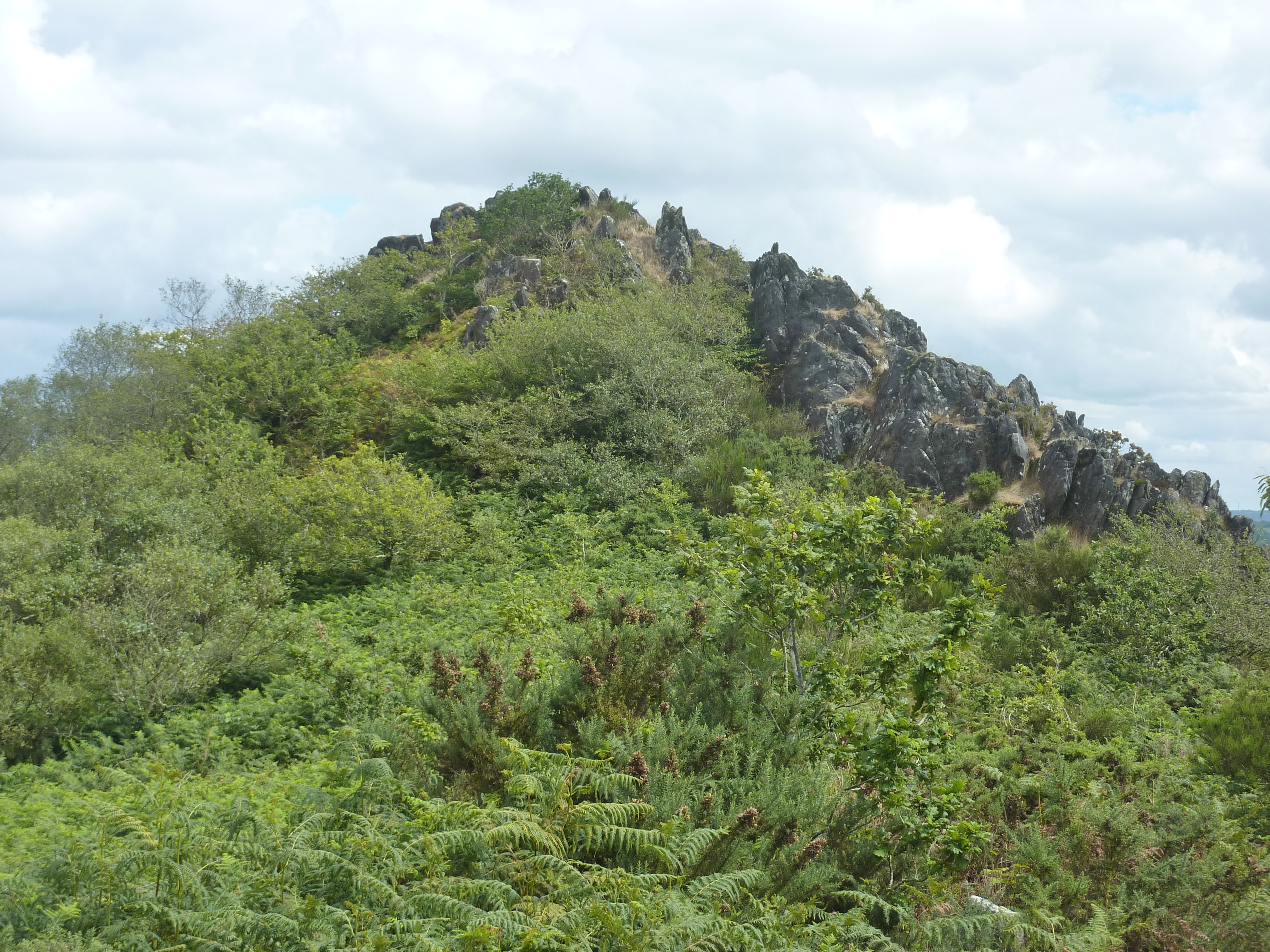 Gouézec : la "Roche du Feu" (Karreg an Tan), 281 mètres d'altitude, vue du sud (un des sommets des montagnes Noires).